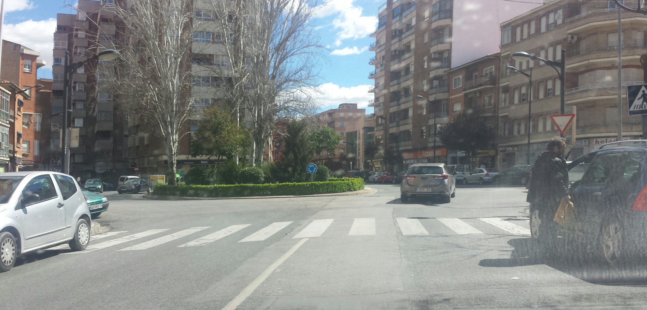 Plaza de Pablo Picasso